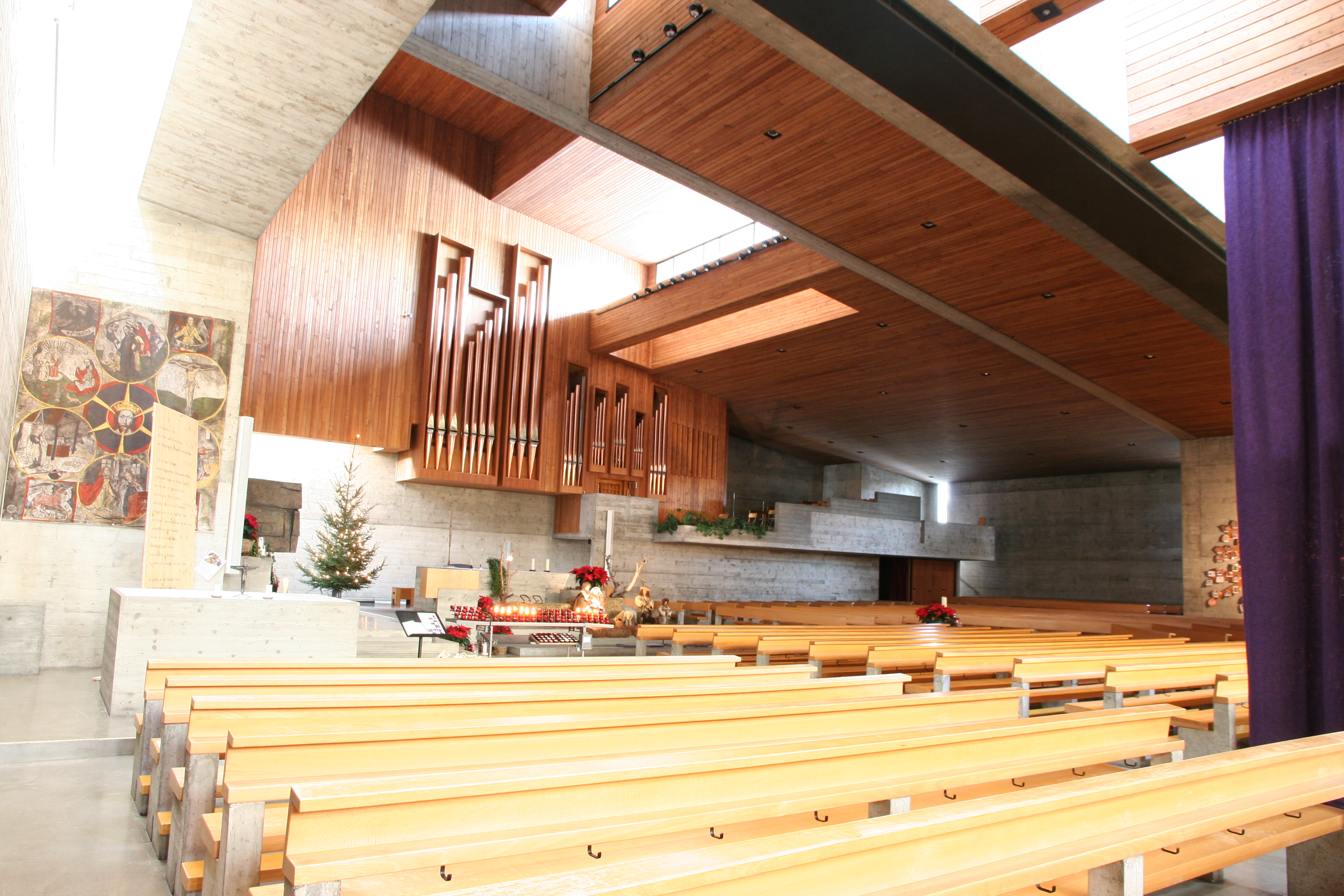 Römisch-katholische Pfarrkirche Herz Jesu in Buchs SG, erbaut von Justus Dahinden